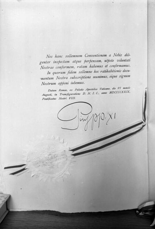 Interessante, bisher unveröffentlichte Aufnahme des ersten und neuesten Staatsvertrages mit dem Vatikan in Rom ! Der erste Staatsvertag zwischen Preussen und dem Heiligen Stuhl, der Konkordats-Vertrag mit der eigenhändigen Unterschrift und dem Siegel des Papstes Pius XI.